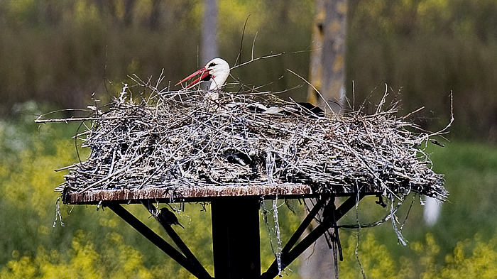 Cigogne dans son nid devant la citadelle de Brouage - Charente Maritime - Photo issue de ma banque d'images